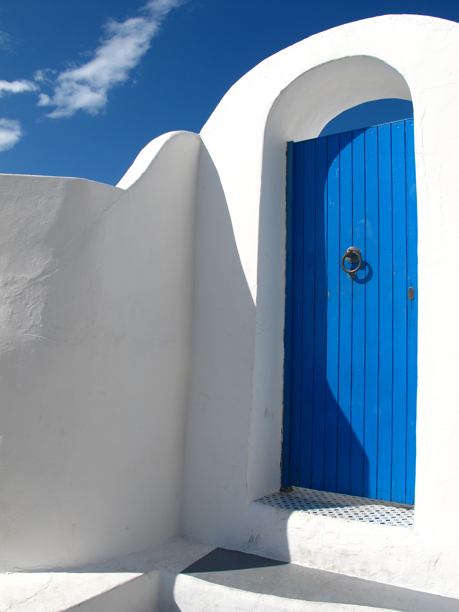 Panarea